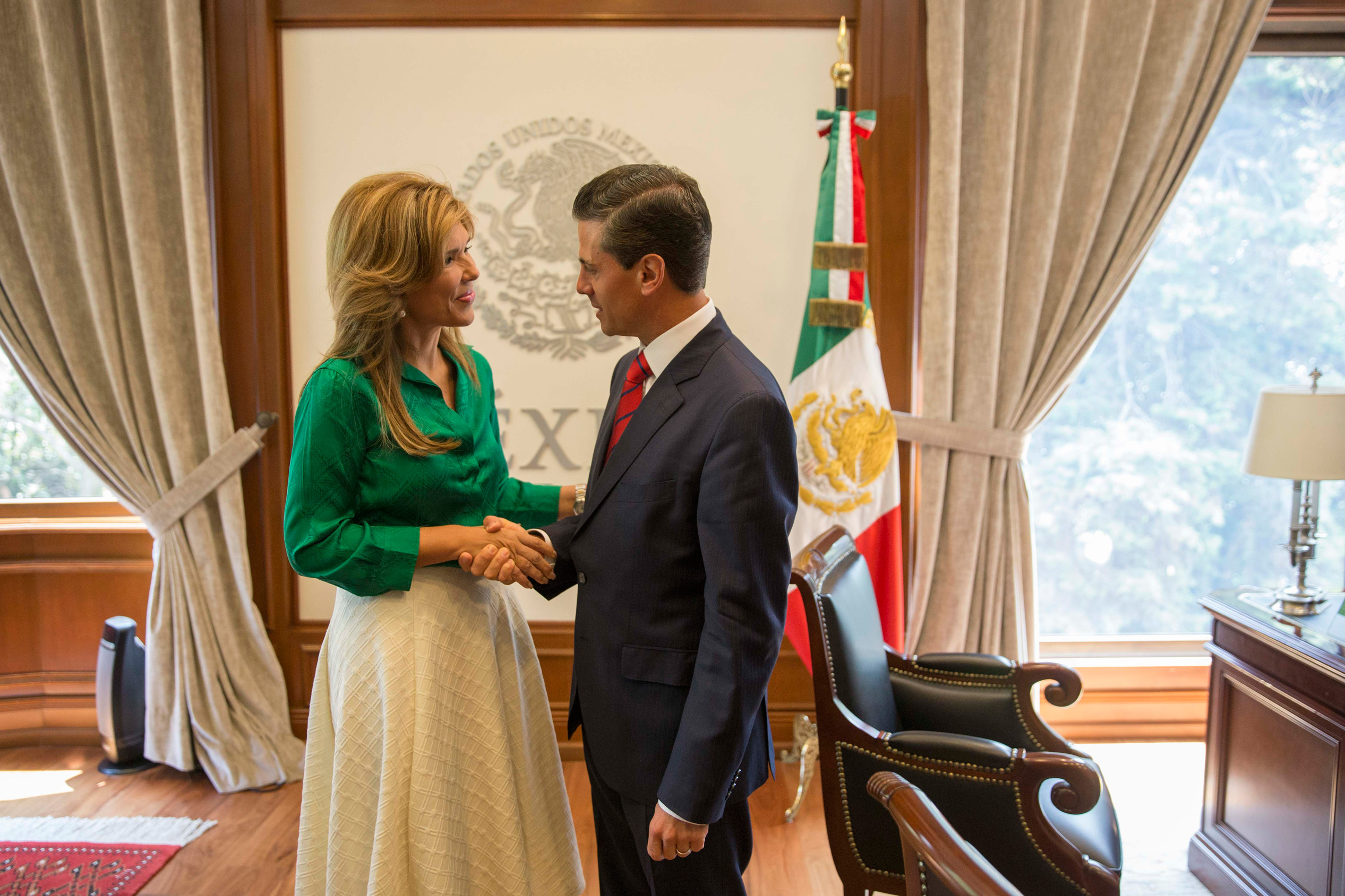 Reunión con Claudia Pavlovich, Gobernadora Electa de Sonora. Residencia Oficial de los Pinos, Ciudad de México. 14 de agosto de 2015.